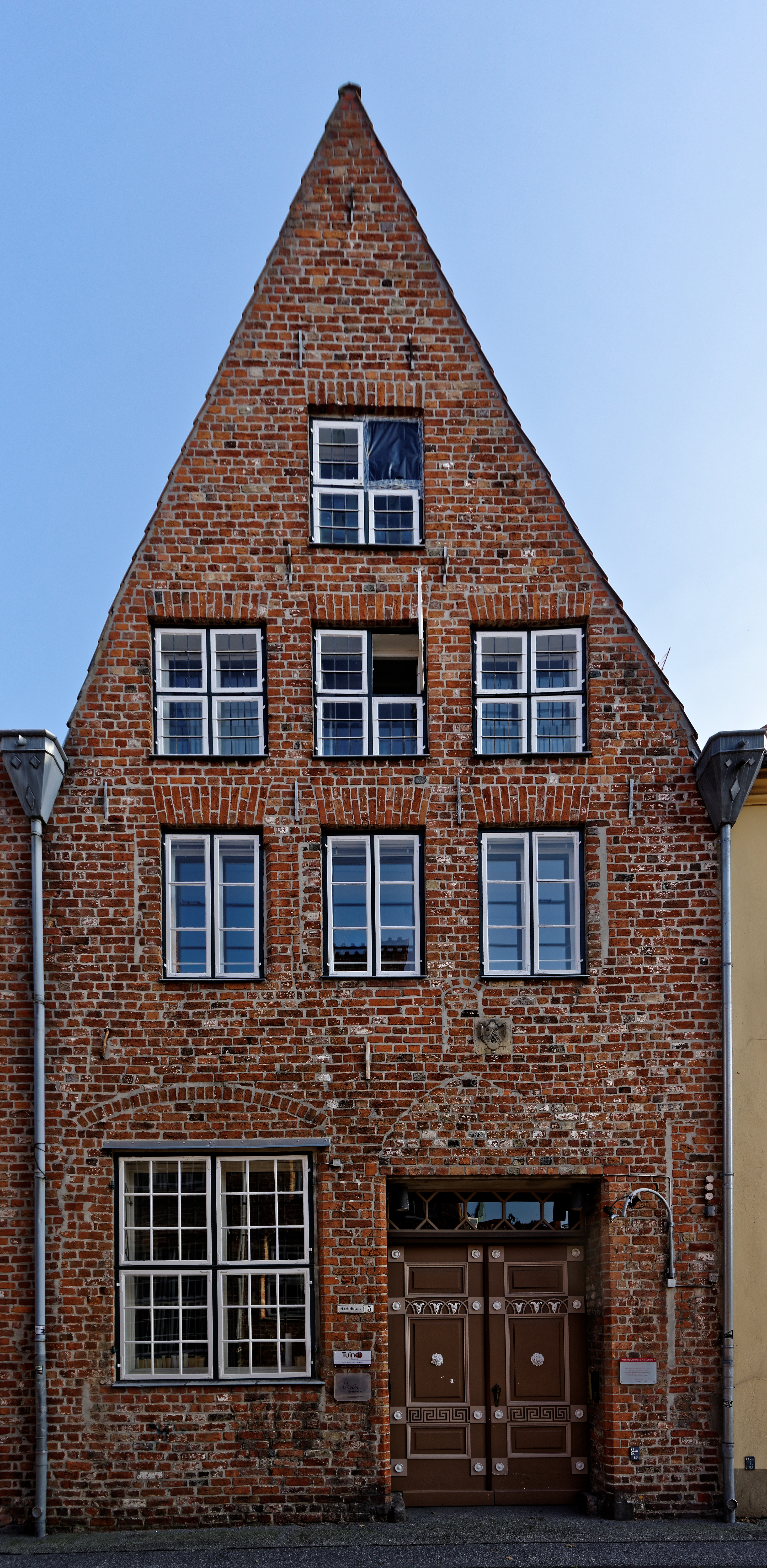 Lübecker Altstadt, Kapitelstraße 5